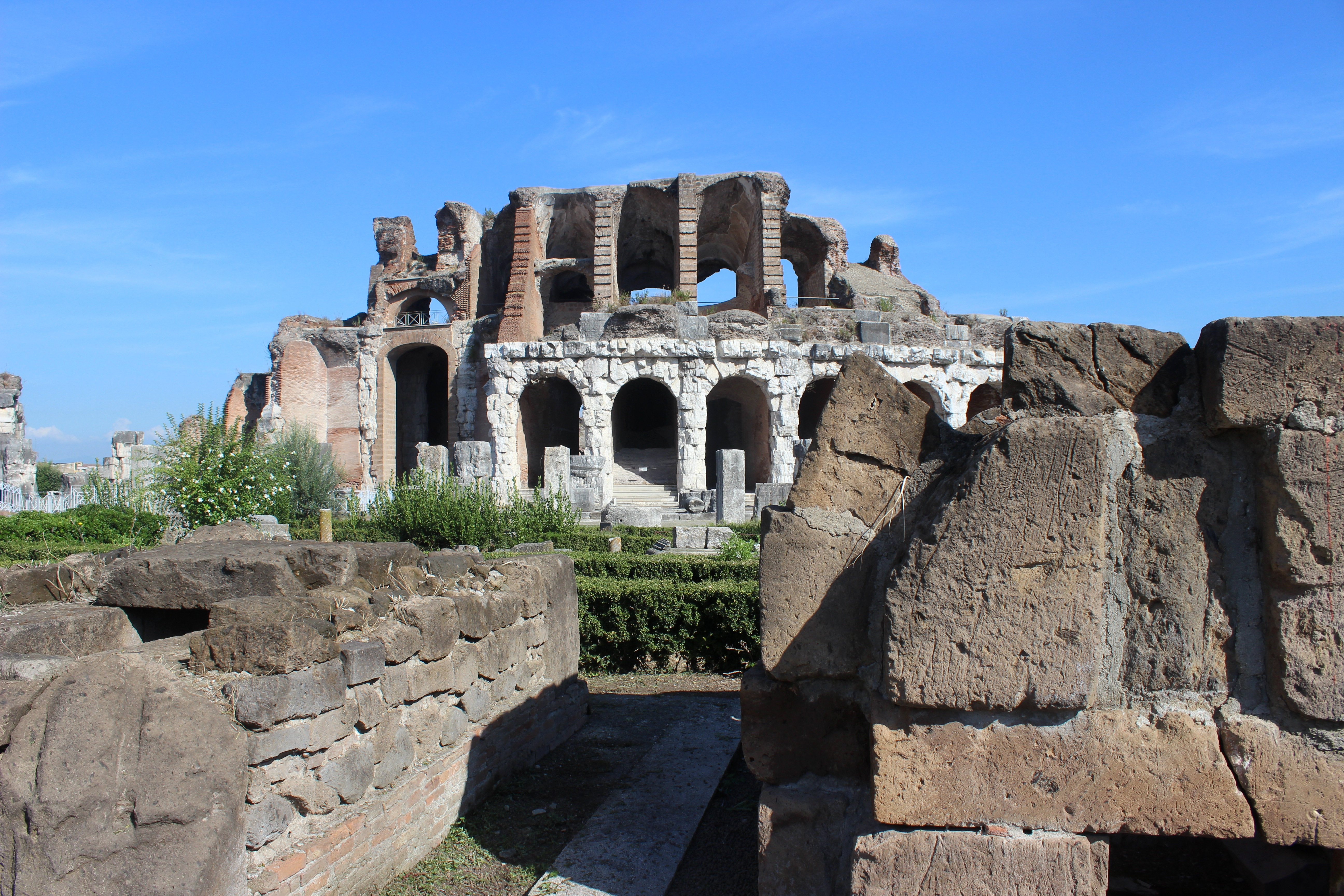 Santa Maria Capua Vetere. Anfiteatro.